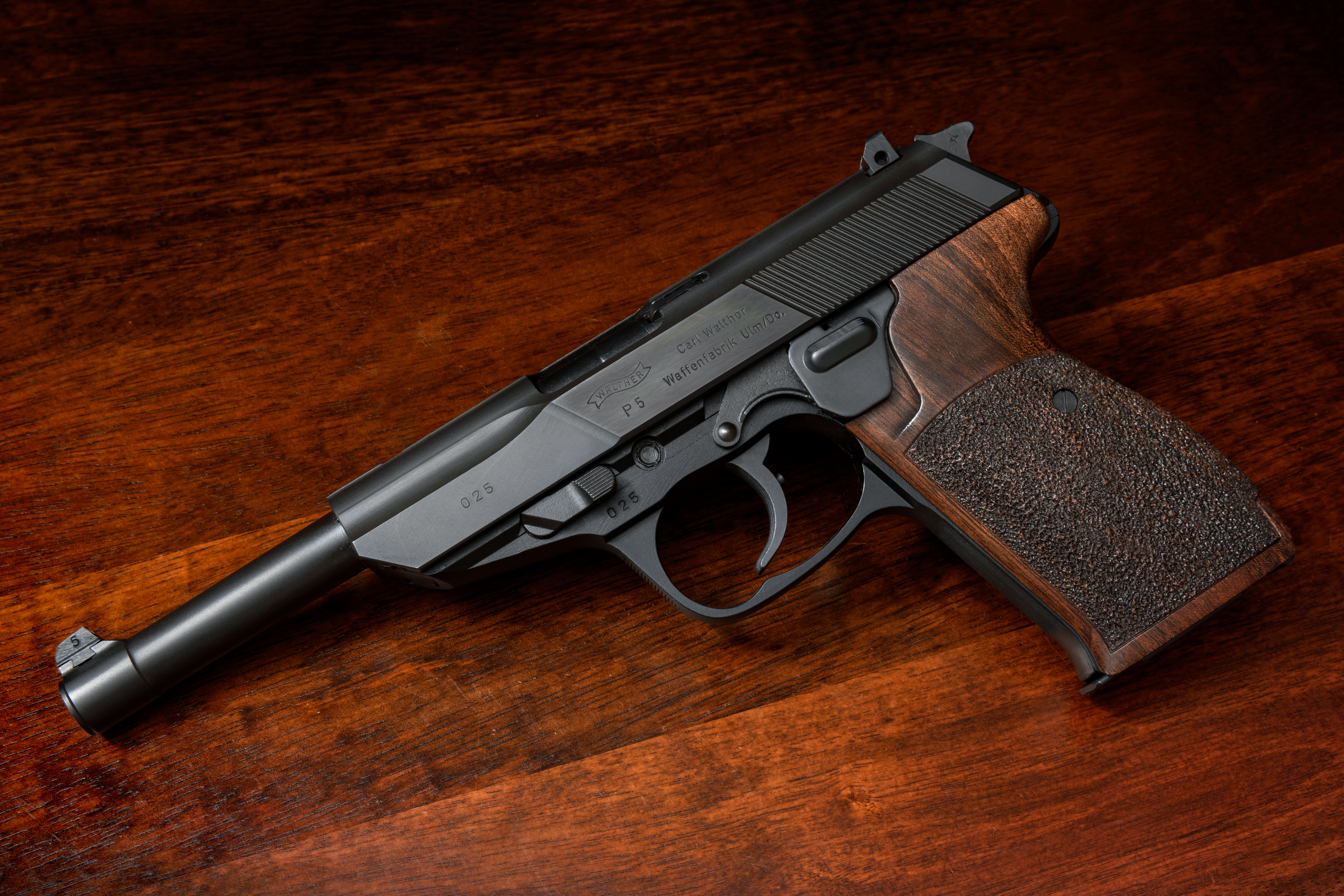 Walther P5 Lang